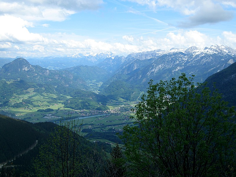 Rossfeldstrasse - Berchtesgaden - Bavaria - Germany